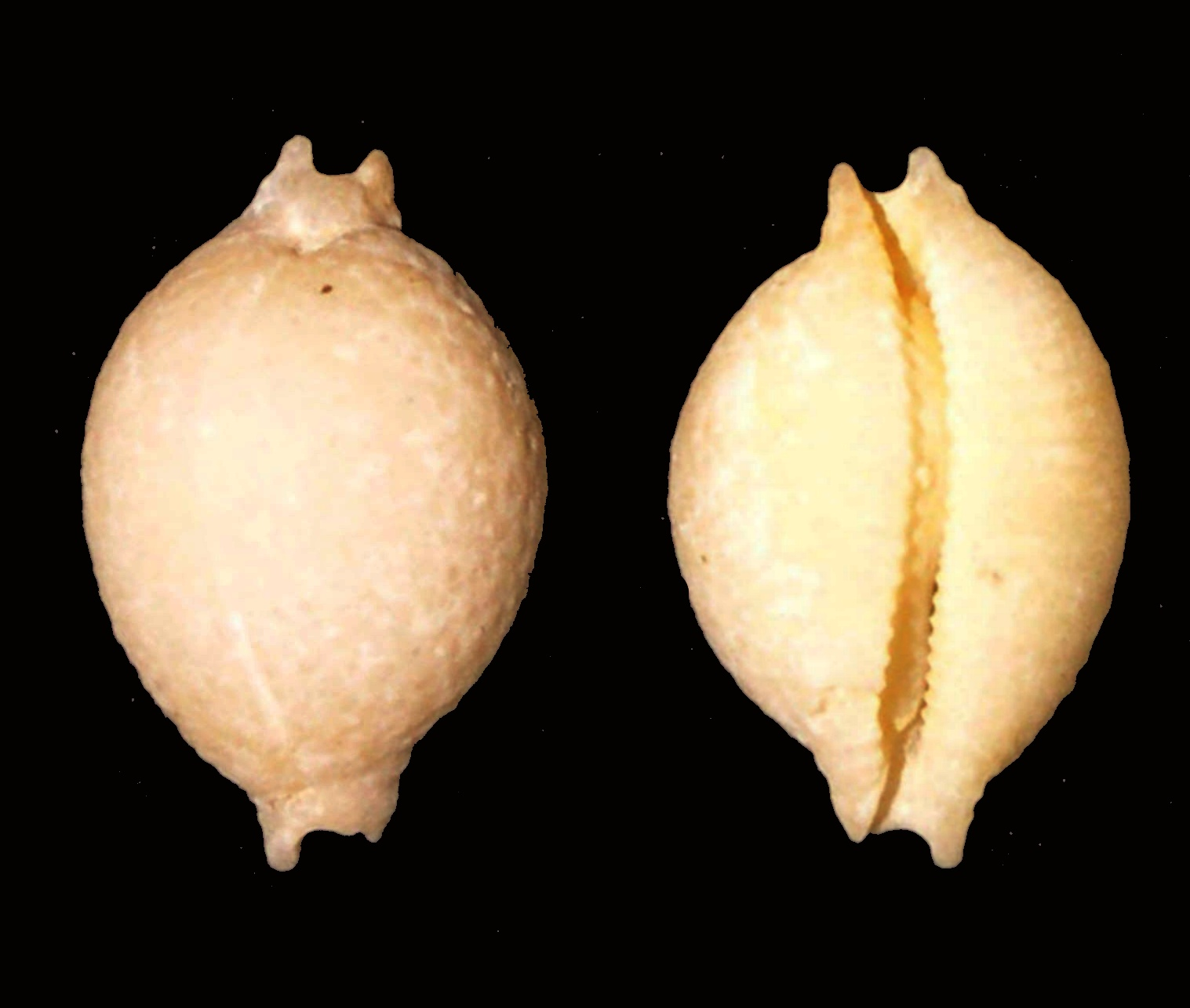 Pustularia cicercula (synonym :Cypraea cicercula)